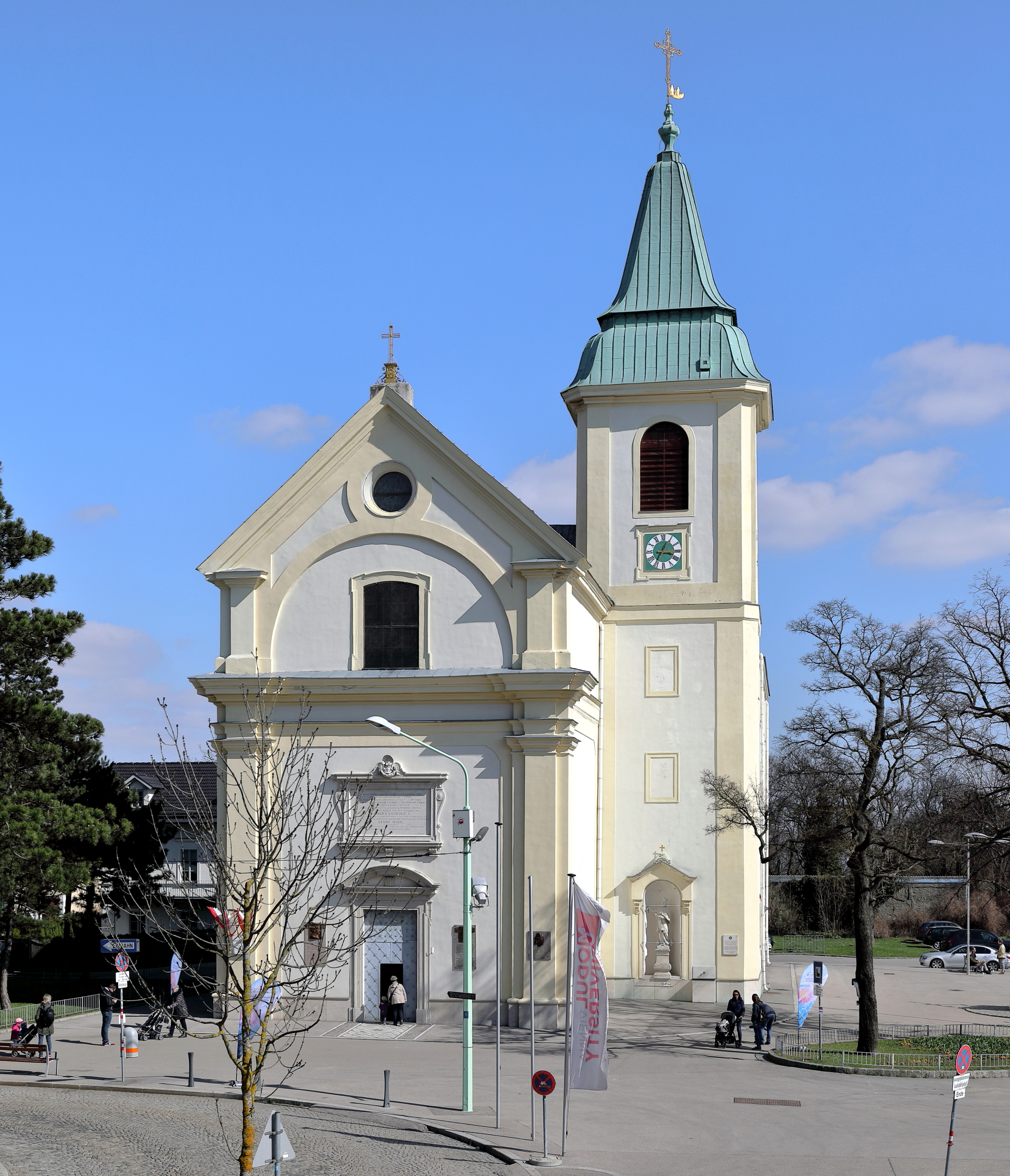 Westansicht der Kahlenbergkirche hl. Josef bzw. Josefskirche am Kahlenberg im 19. Wiener Gemeindebezirk Döbling. Der Sakralbau wurde ab 1629 im Zuge der Kamaldulenser-Klostergründung als Klosterkirche errichtet. Er verfiel mehrfach und wurde mehrfach wieder instandgesetzt sowie geweiht. Im Jahr 1906 kam die Kirche in den Besitz der polnischen Ordensgemeinschaft der „Kongregation der Auferstehung des Herrn“, die diese innen und außen mit hohem Kostenaufwand renovierte und seitdem betreut.